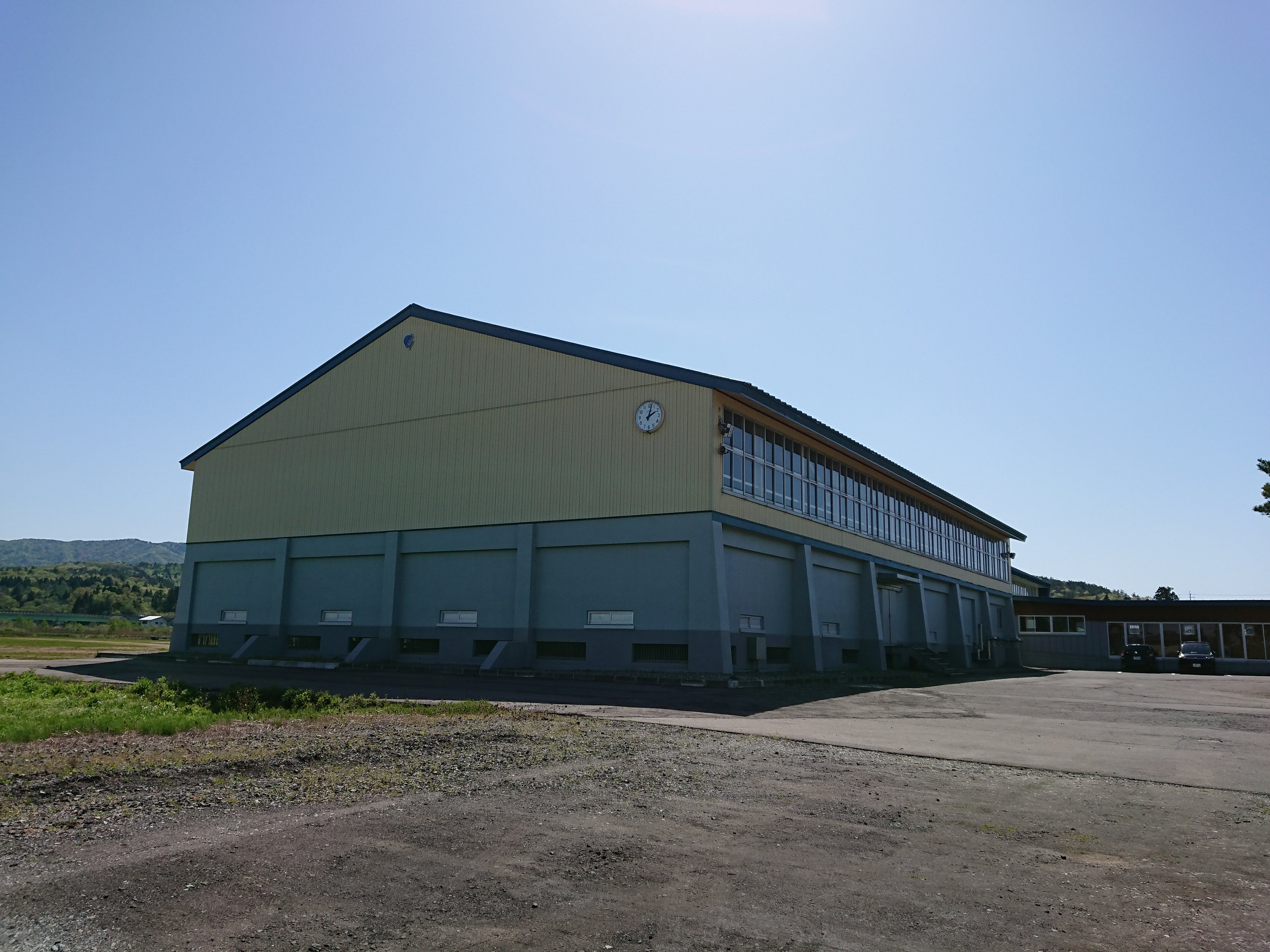 新潟県立柏崎総合高等学校の体育館